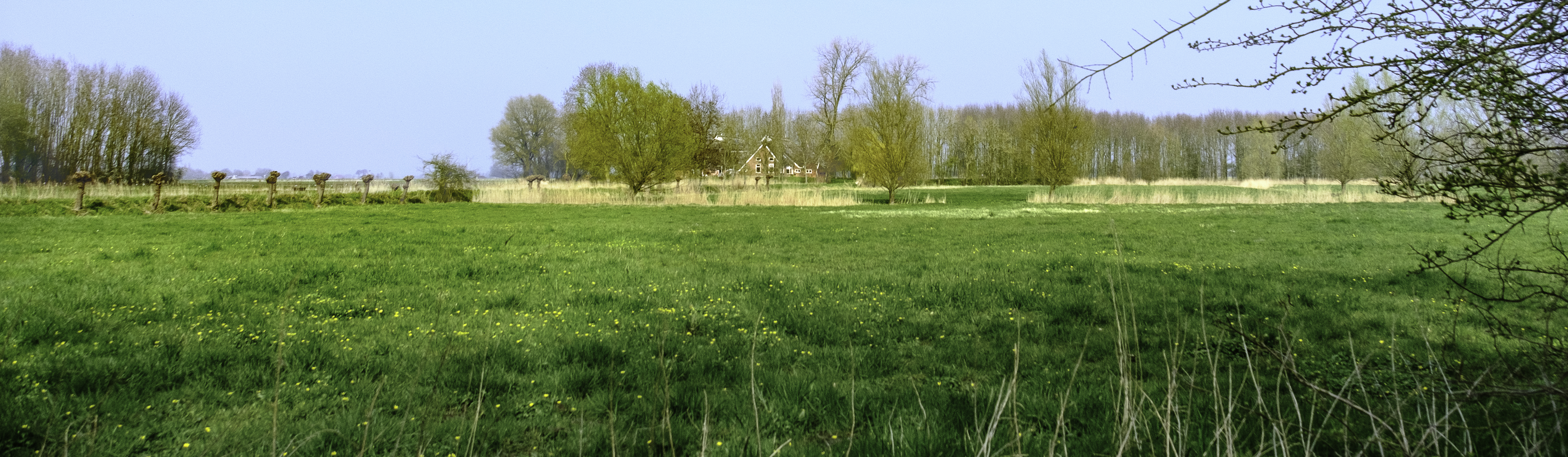 Wierdeterrein van de in 1893 afgegraven wierde van Eekwerd